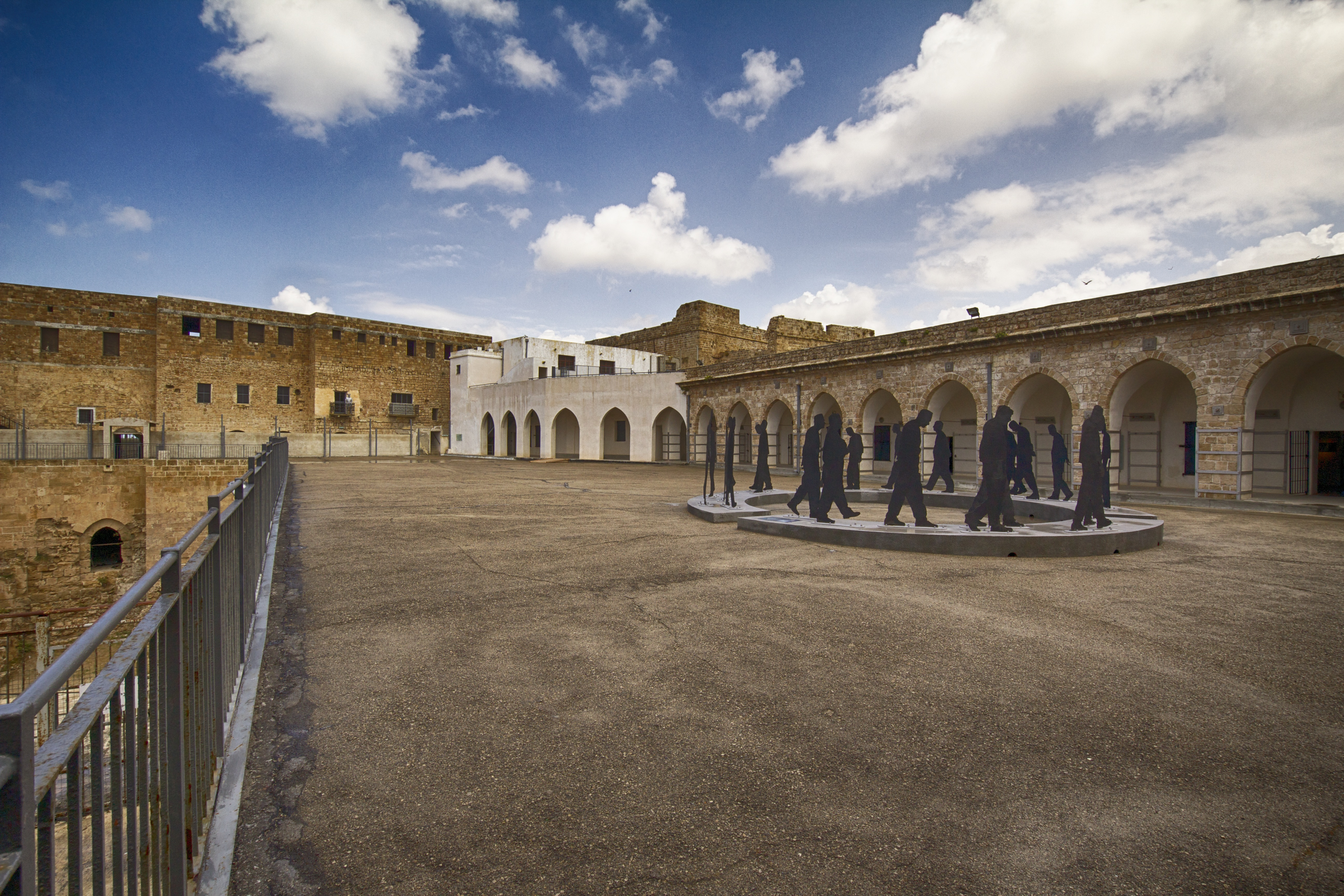 מוזיאון אסירי המחתרות בעכו הוא מוזיאון הנצחה לחברי המחתרות העבריות בתקופת המנדט הבריטי, שנכלאו בכלא עכו. המוזיאון משוכן במבצר עכו אשר נבנה בתקופה העות'מאנית. המבצר שימש בתקופת השלטון העות'מאני כבסיס צבאי, מעון מושל עכו ואף בית סוהר.